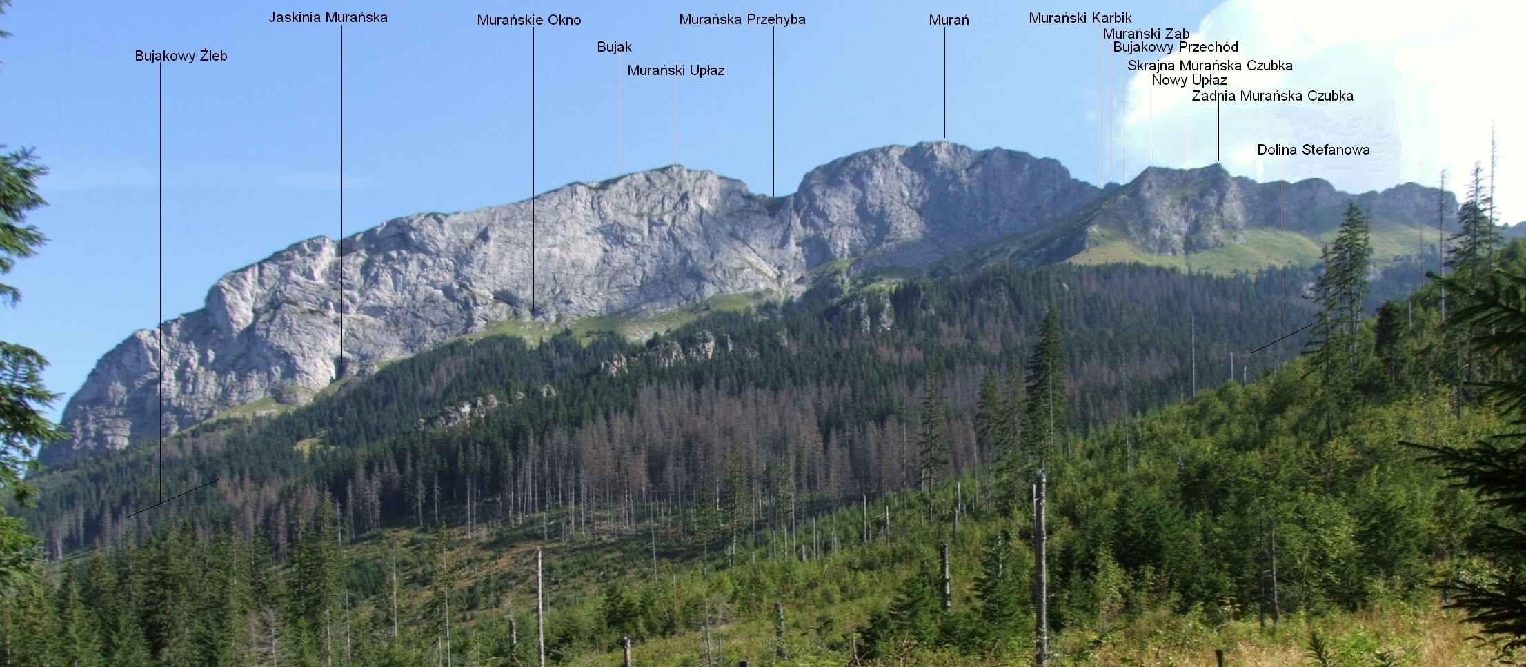 Murań